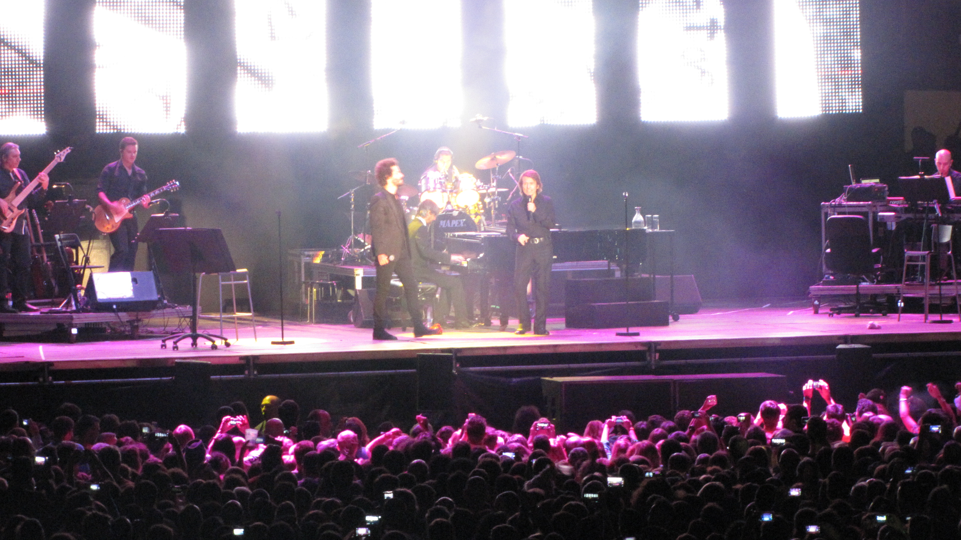 Concierto Raphael con Juan Alberto (Niños Mutantes) cantan "Estuve enamorado" Sonorama 2014 (Aranda de Duero)